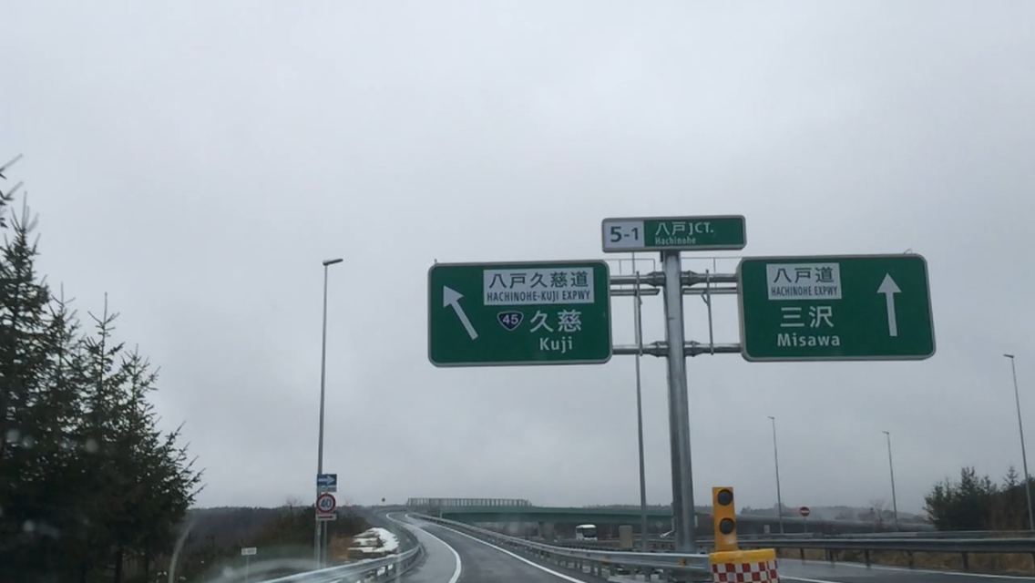 八戸JCT 第二分岐ポイント